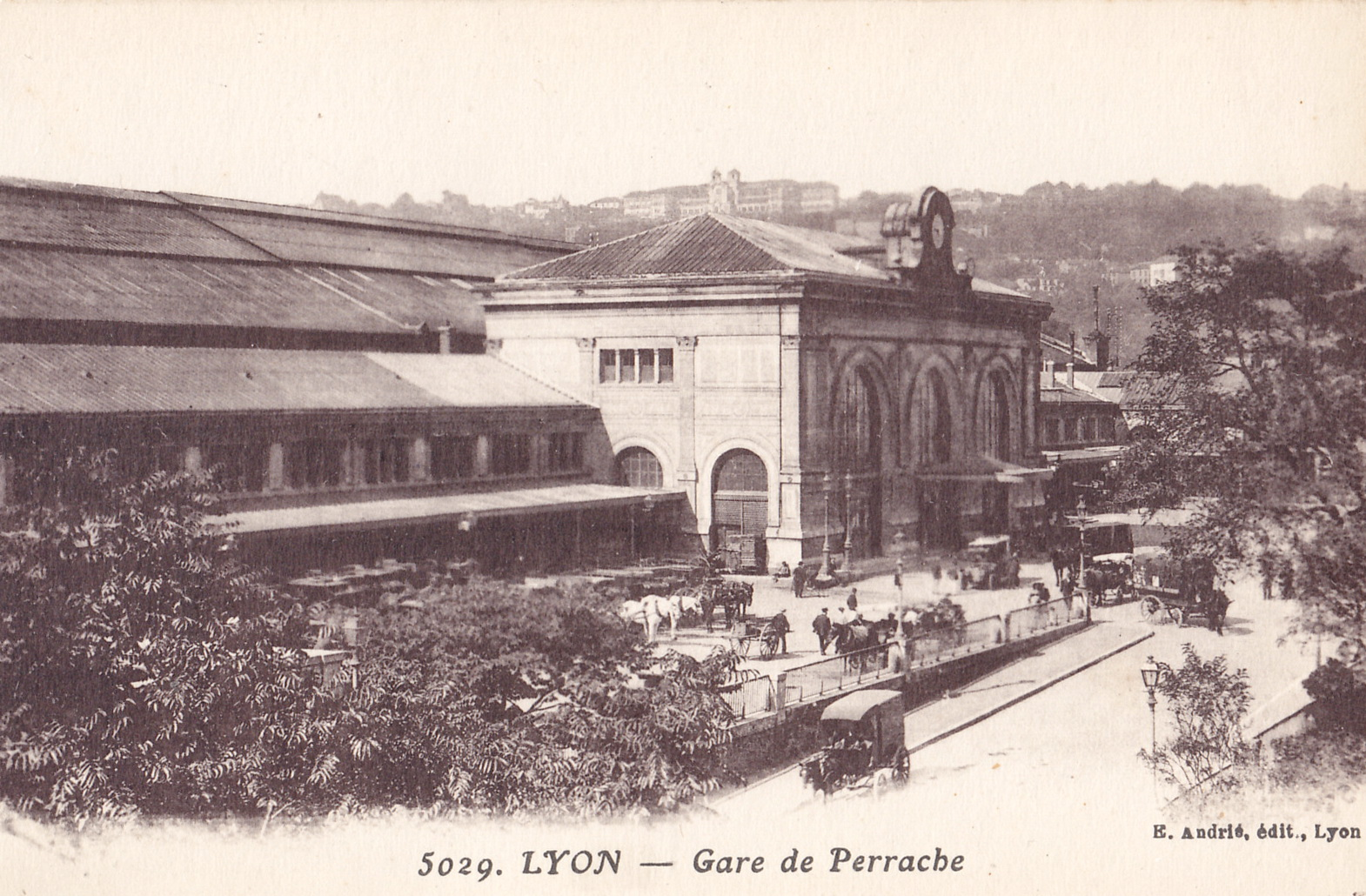 Carte postale ancienne éditée par E Andrié à Lyon, n°5029 : LYON - Gare de Perrache